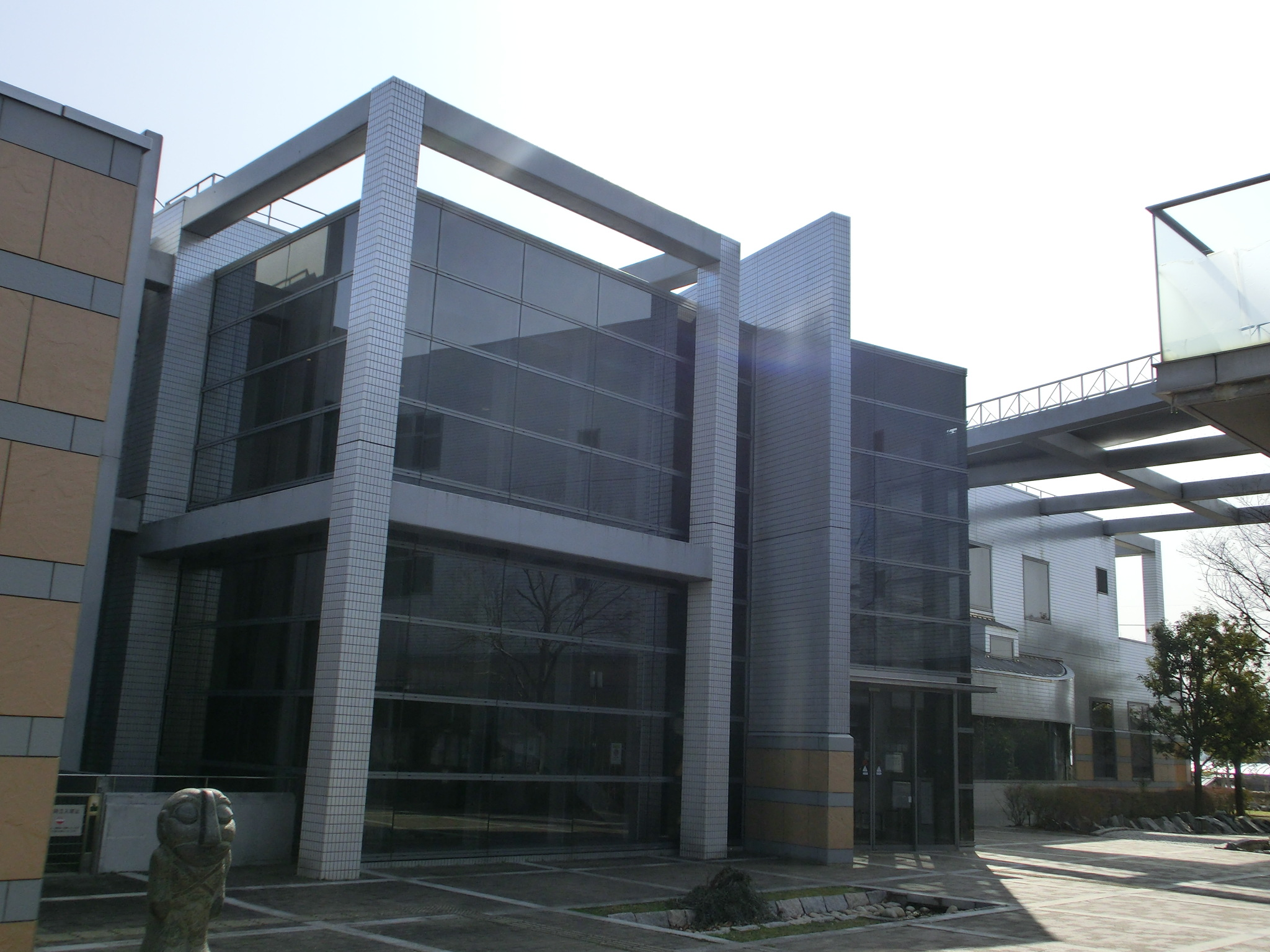 泉佐野市立中央図書館